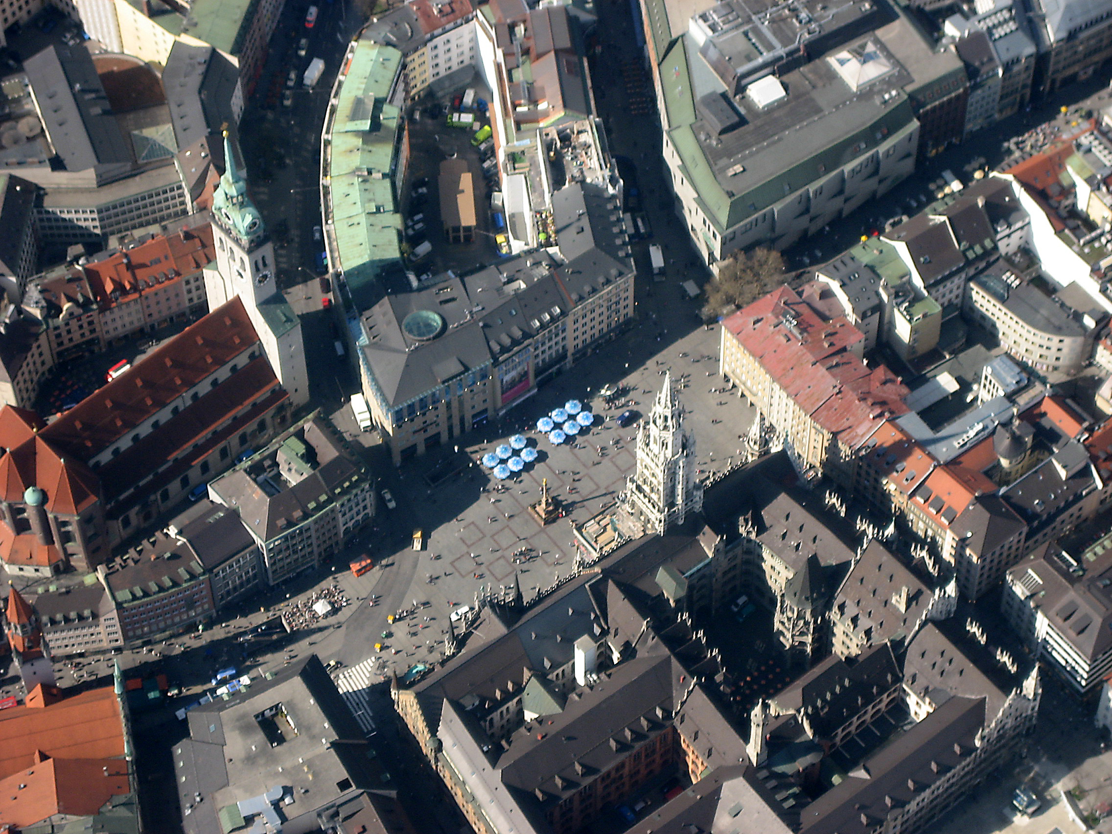 Luftbild vom Marienplatz in München mit Altem Peter (links oben) und Rathaus (unten)